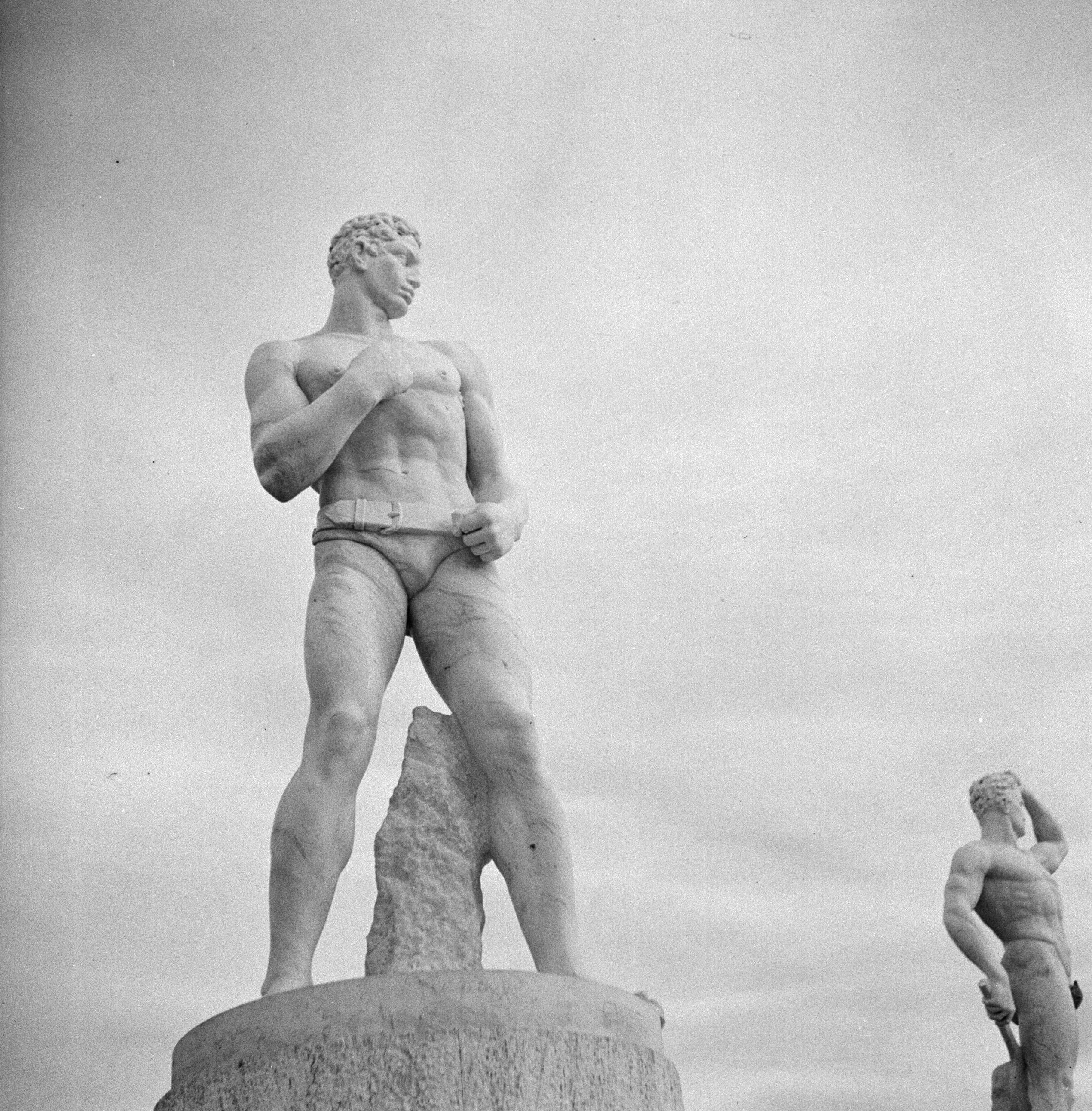 Collectie / Archief : Fotocollectie Van de Poll Reportage / Serie : Rome: Bezoek aan het Foro Mussolini Beschrijving : Beeld van een worstelaar in het Stadio dei Marmi onderdeel van het sportcomplex Foro Mussolini Annotatie : In 1944 is de naam van het Foro Mussolini gewijzigd in Foro Italico Datum : december 1937 Locatie : Italië, Rome Trefwoorden : beeldhouwwerken, natuursteen, sportaccommodaties, stadions, worstelen Fotograaf : Poll, Willem van de Auteursrechthebbende : Nationaal Archief Materiaalsoort : Glasnegatief Nummer archiefinventaris : bekijk toegang 2.24.14.02 Bestanddeelnummer : 191-1329